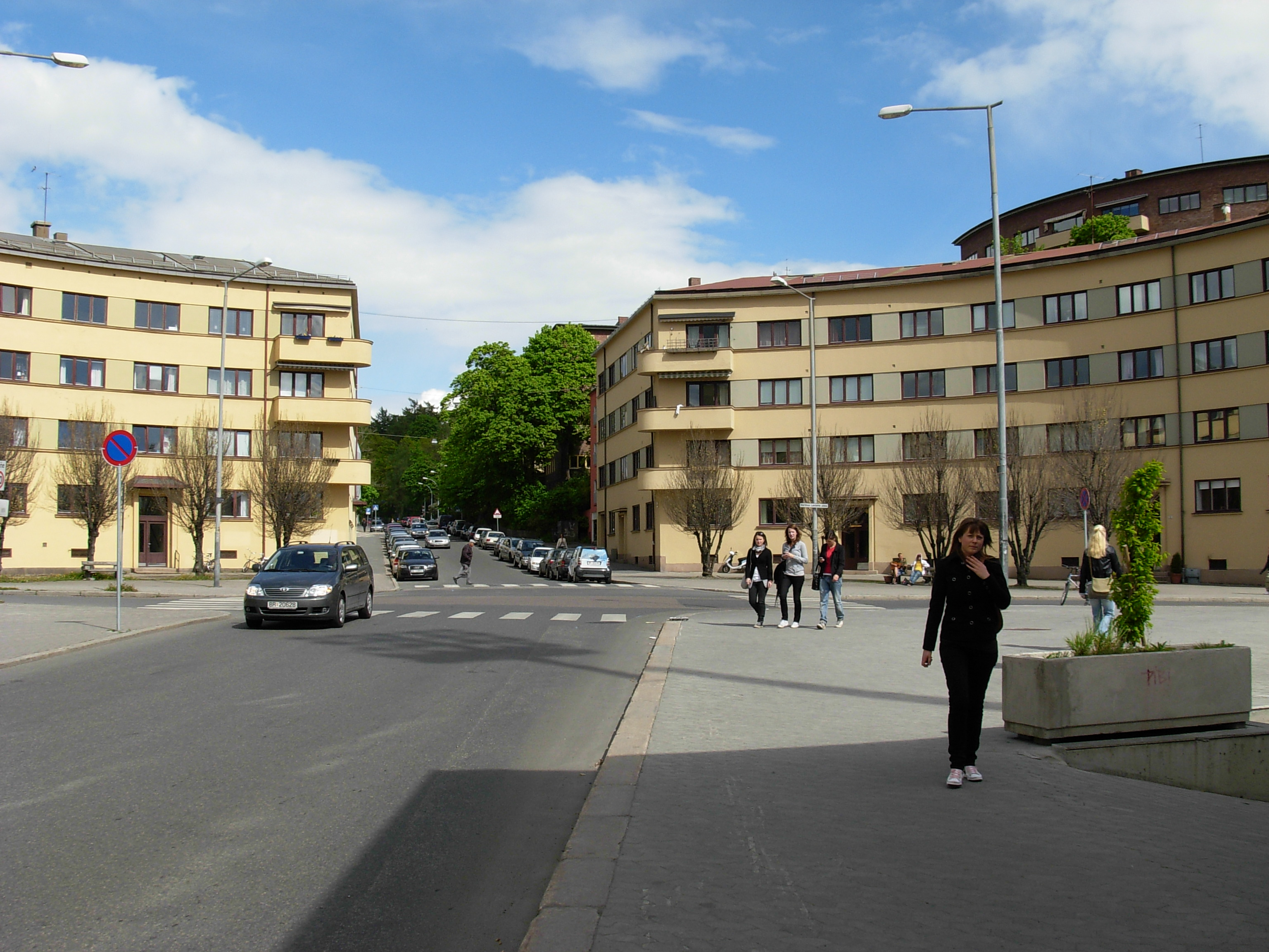 Martinius Lørdahls plass, Bislett, Oslo